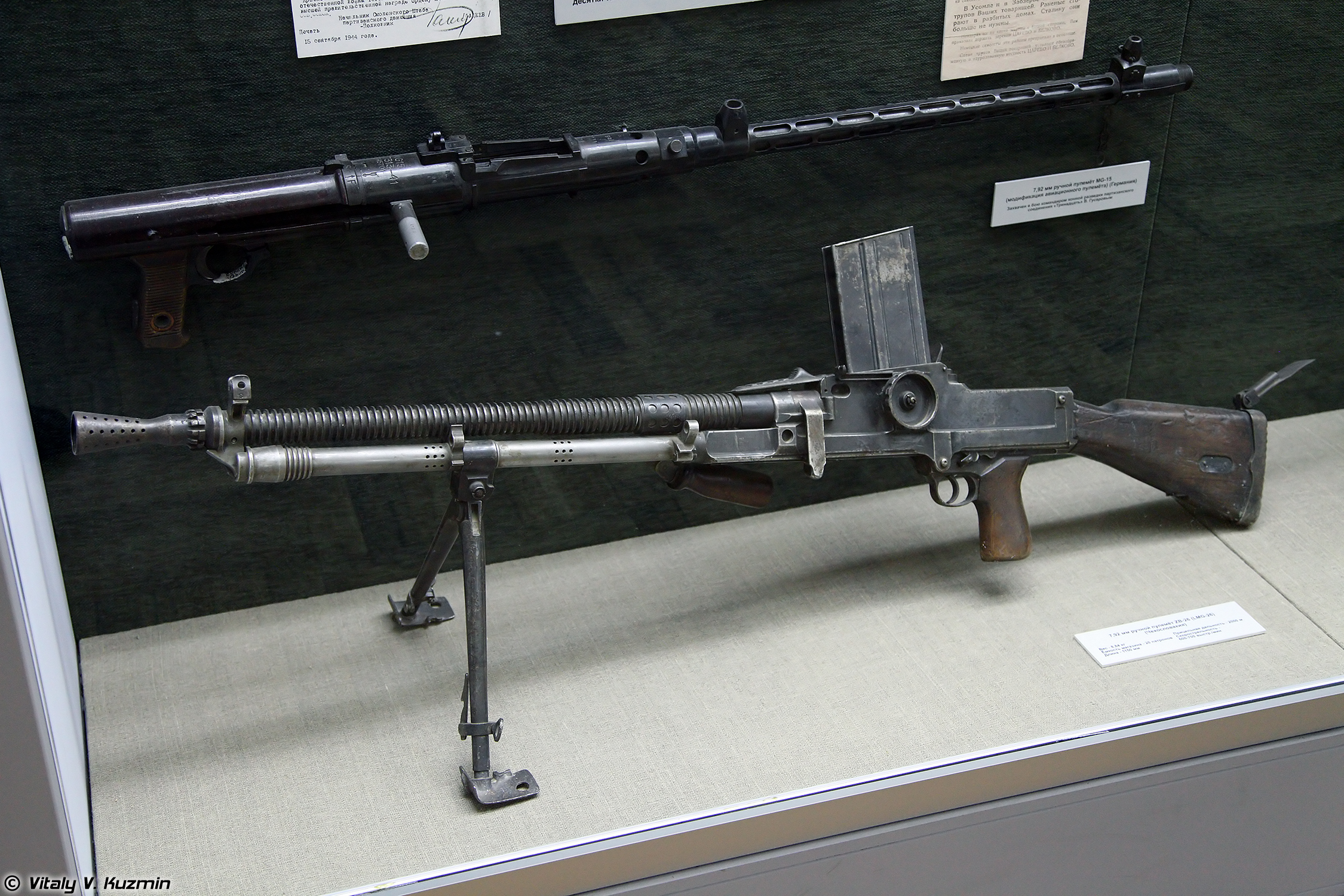 Пулемет ZB vz. 26